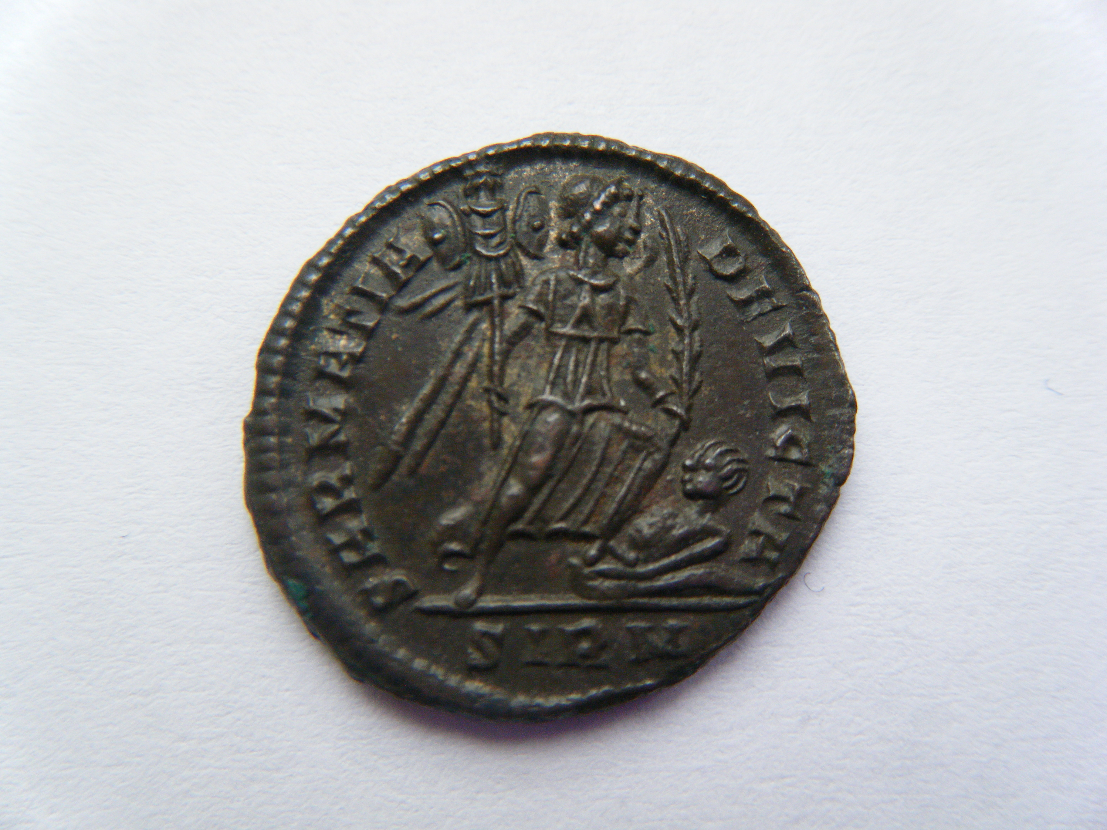 Rückseite einer Bronzemünze des Constantinus mit der Umschrift SARMATIA DEVICTA